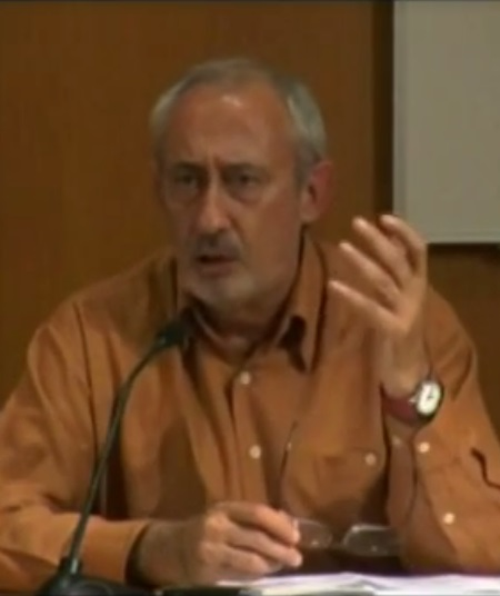 Conferencia de Jordi Casassas (Barcelona, 24 de octubre de 2014).